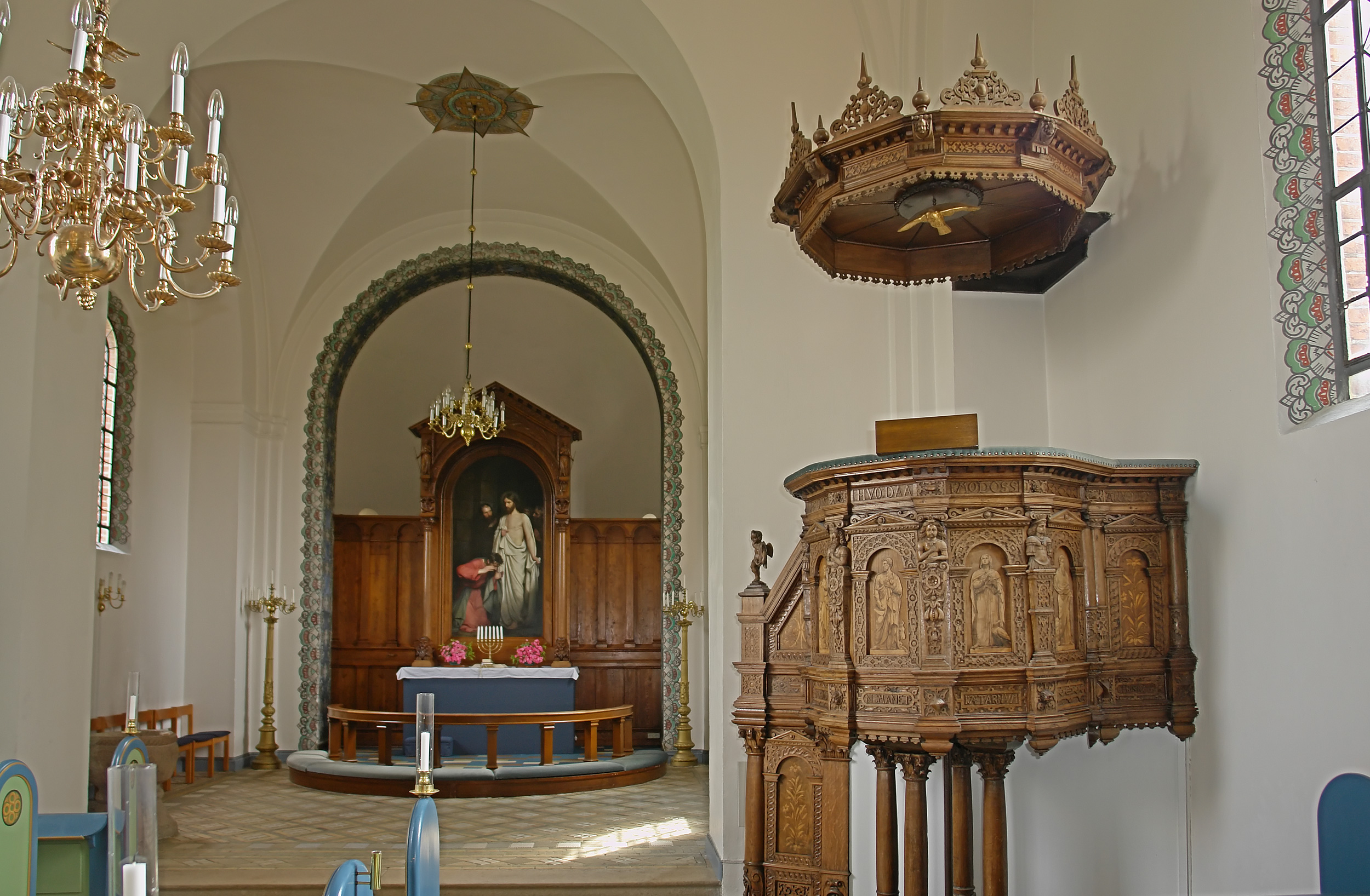 Kirche von Ugerløse, Dänemark (West-Seeland). Altarbild mit dem Motiv des Ungläubigen Thomas malte Carl Bloch 1881, Kanzel aus dem Jahr 1600 mit einem Kanzelhimmel aus dem Jahre 1876